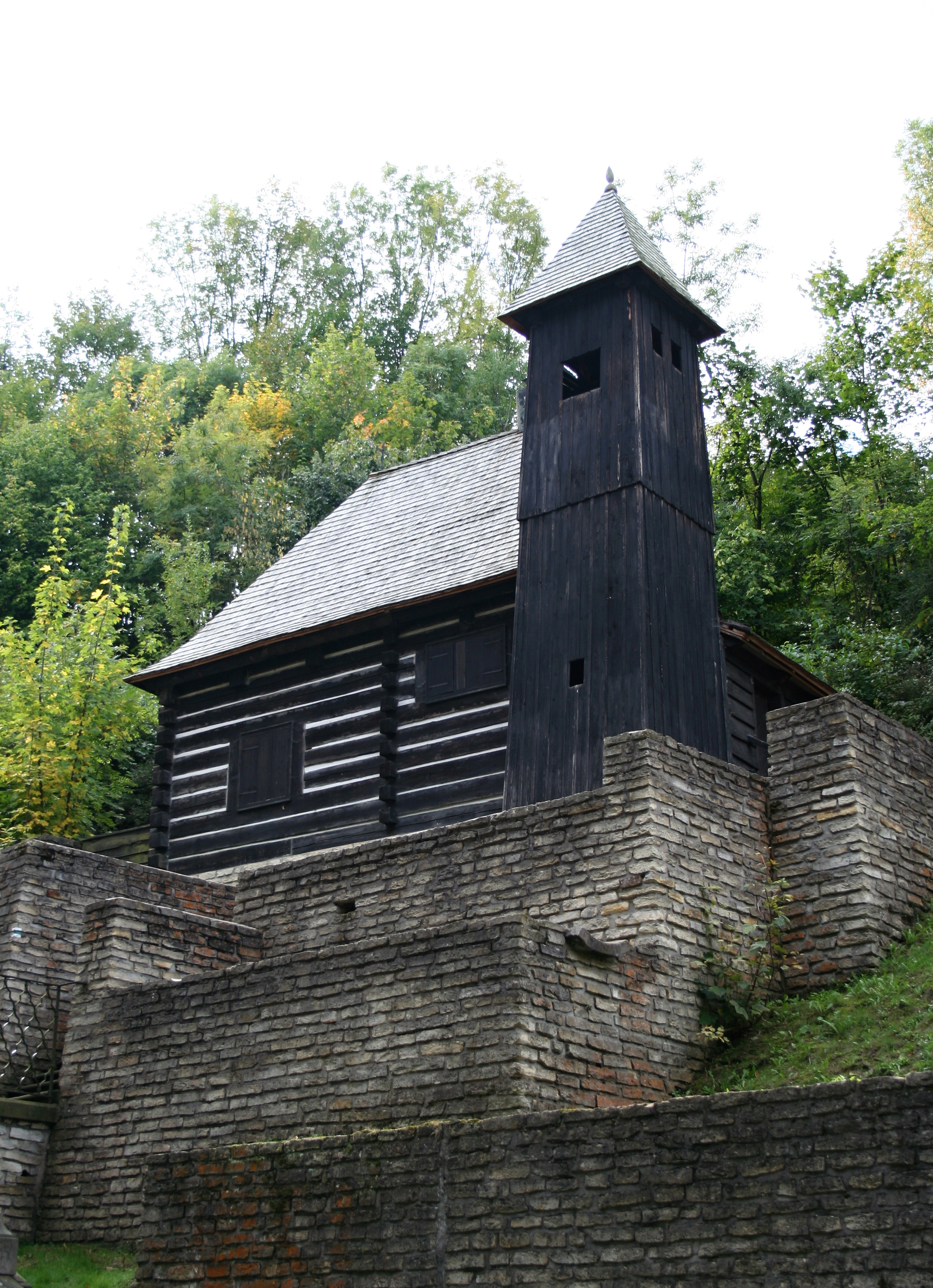 Kostel sv. Mikuláše (Svatý Mikuláš), Svatý Mikuláš